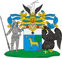 Герб из Общего гербовника дворянских родов Российской империи